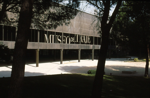 Fotografía. Salas de exposición permanente del Museo del Traje.